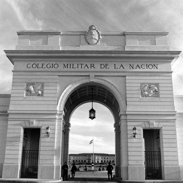 La puerta del Colegio Militar de la Nación